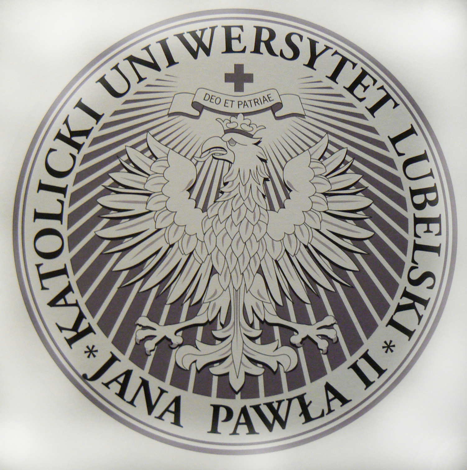 kul